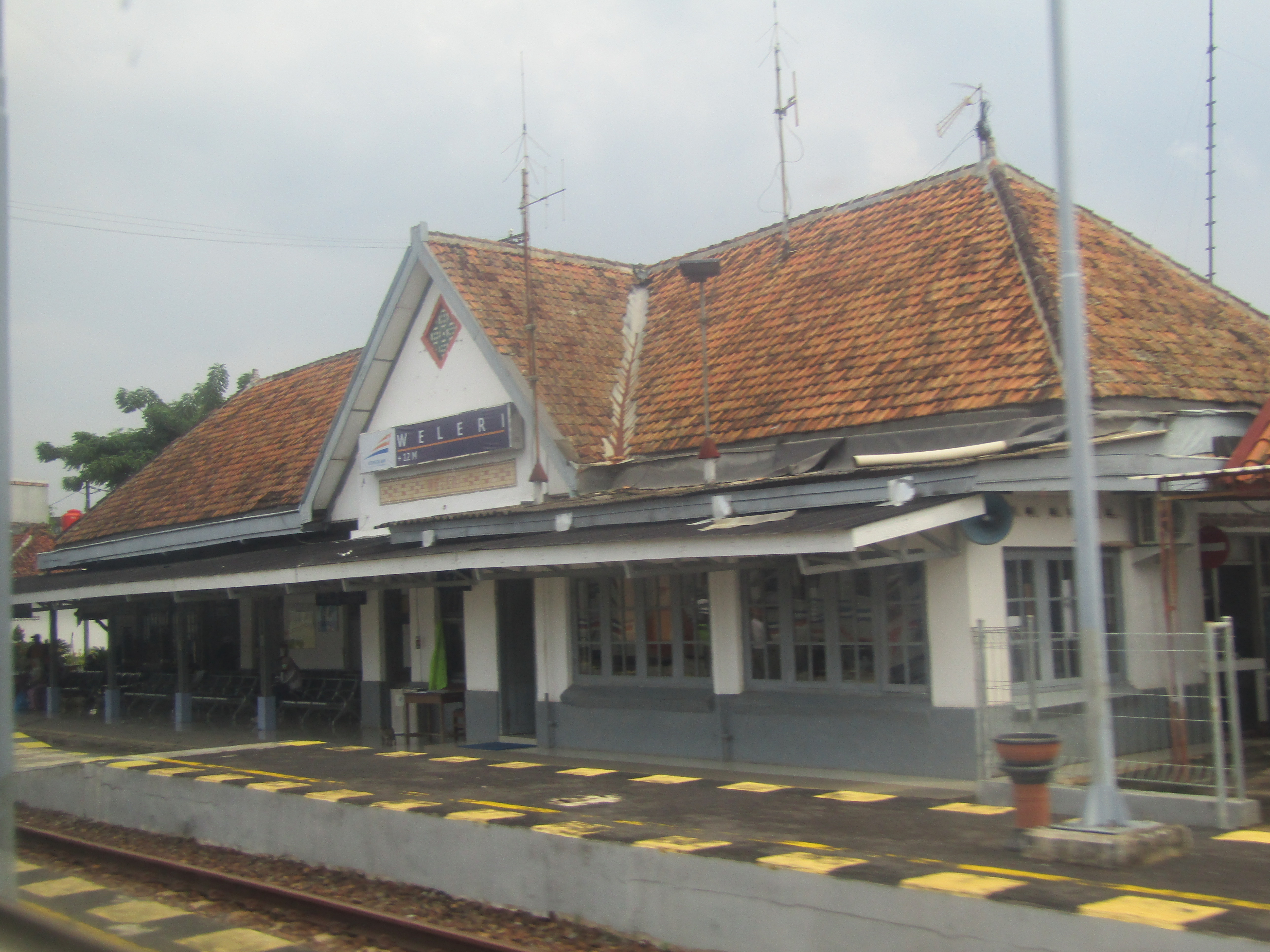 Tampak peron bangunan Stasiun Weleri, 2019